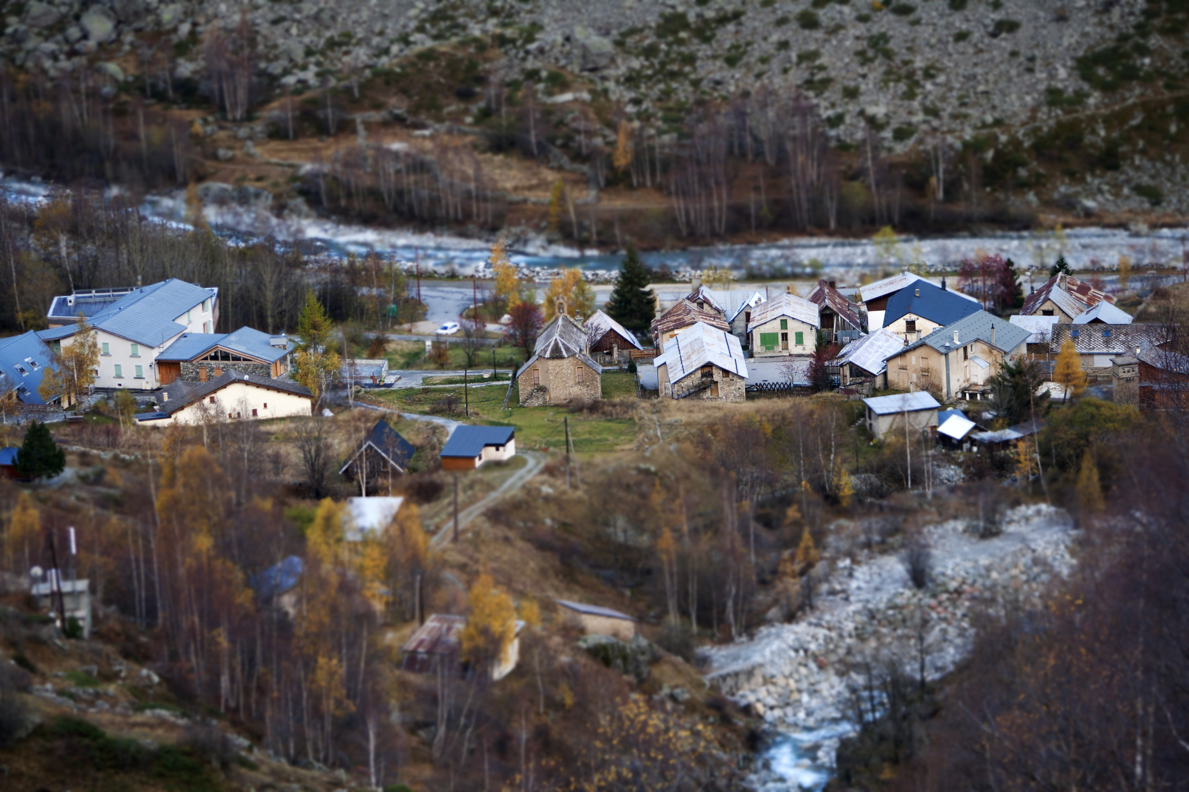 La Bérarde à l'automne vue du nord